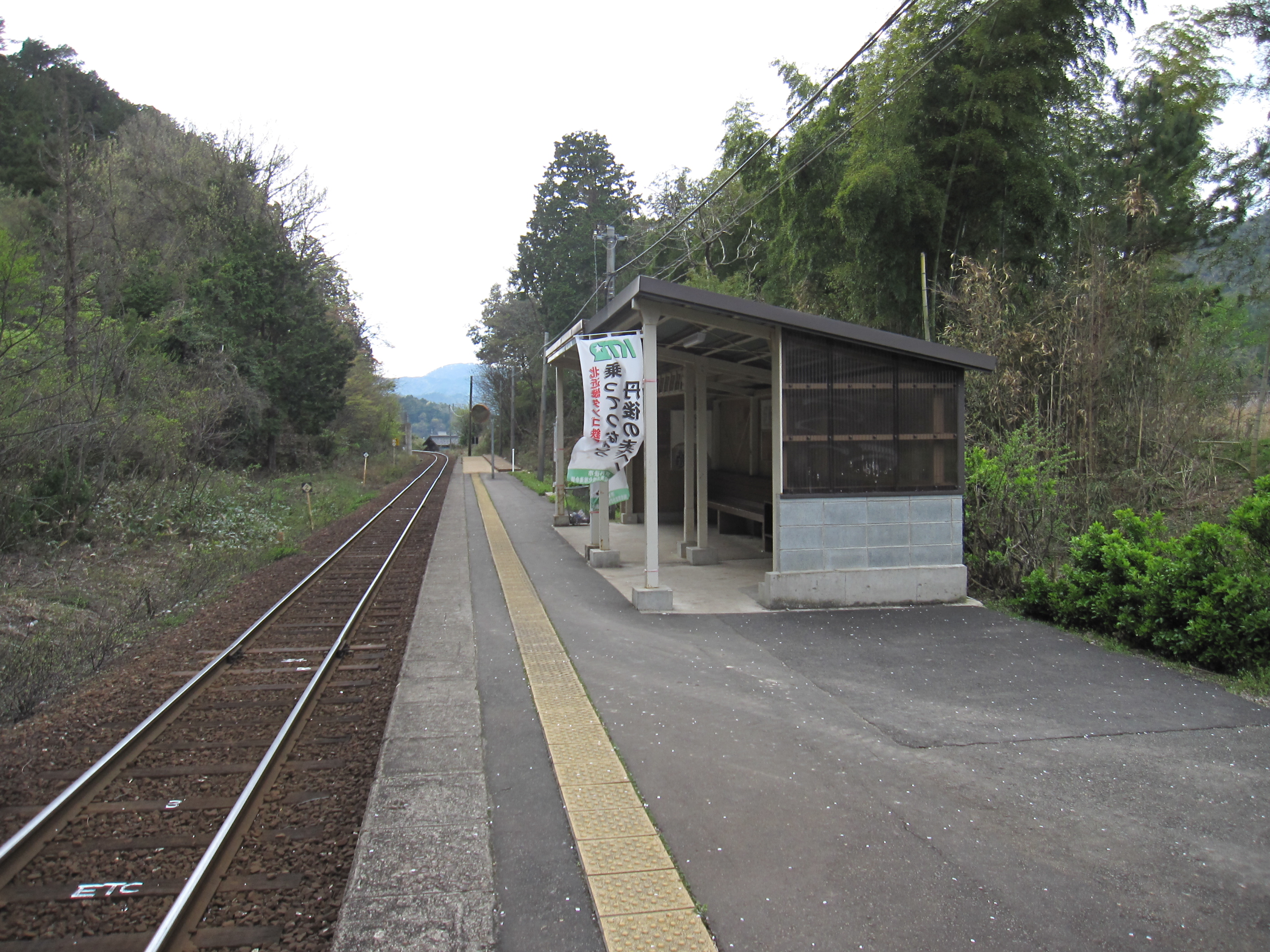 北近畿タンゴ鉄道甲山駅